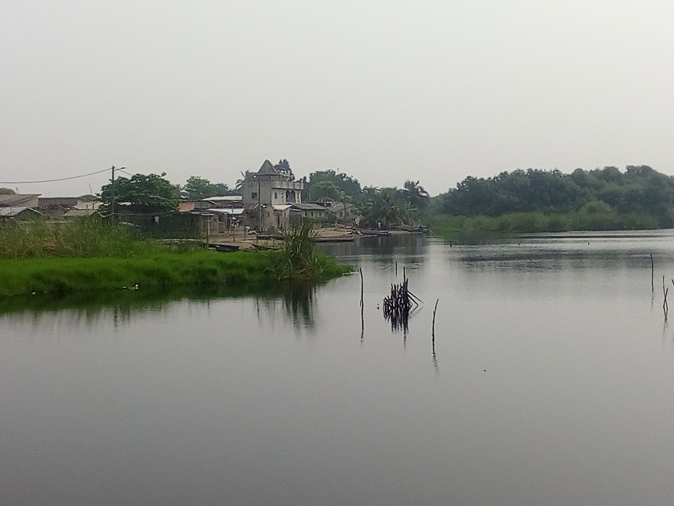 Togbin